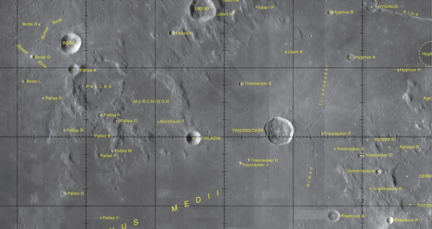 Cráter Chladni (LRO)